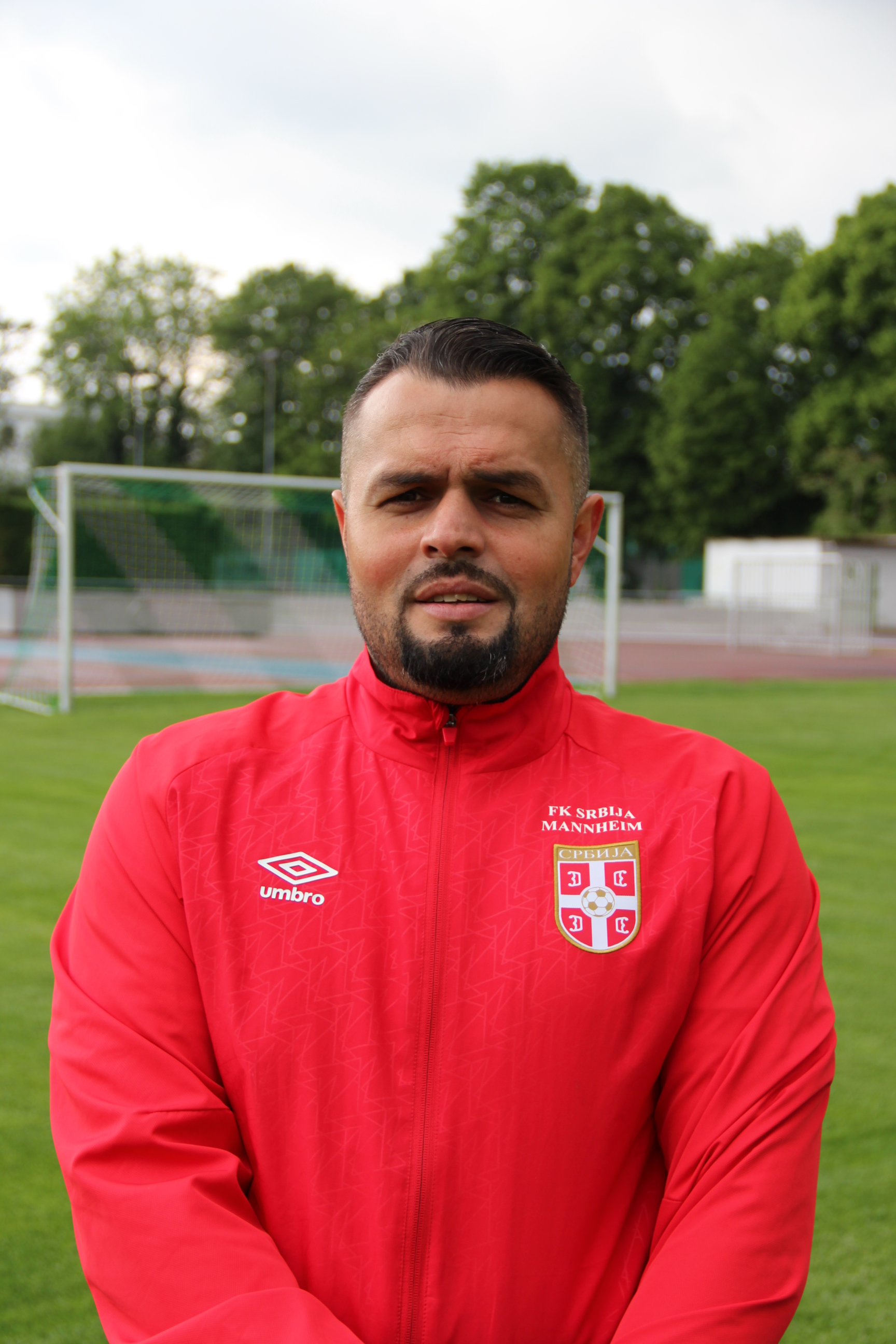 Trainer beim FK Srbija Mannheim, Saison 2015/16